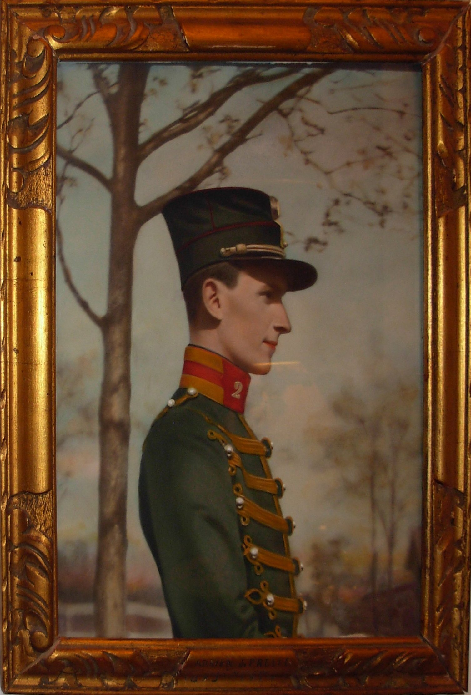 Portrait d'Adrien de Prelle de la Nieppe (1893-1914)